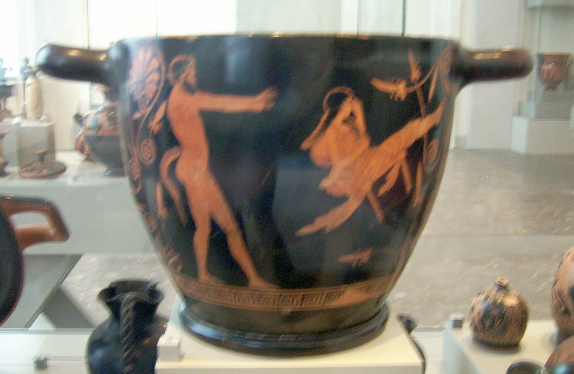 Attisch-rotfiguriger Skyphos des Penelope-Malers mit der Darstellung des athenischen Blütenfestes, Rückseite: Ein Silen mit Strahlenbinde stößt ein schaukelndes Mädchen ab. Anbei eine Kalos-Inschrift ("Schön bist du, Antheia"), um 440 v. Chr., gefunden in Chiusi, 1846 erworben, seit 1848 in der Antikensammlung Berlin/Altes Museum, Inventarnummer F 2589, Höhe 20,3cm